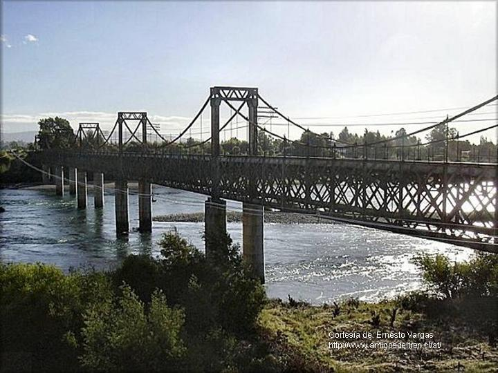 Puente rio Toltén (Pitrufquén, Provincia de Cautín en la IX Región de Araucanía, Chile.) [1] [2]